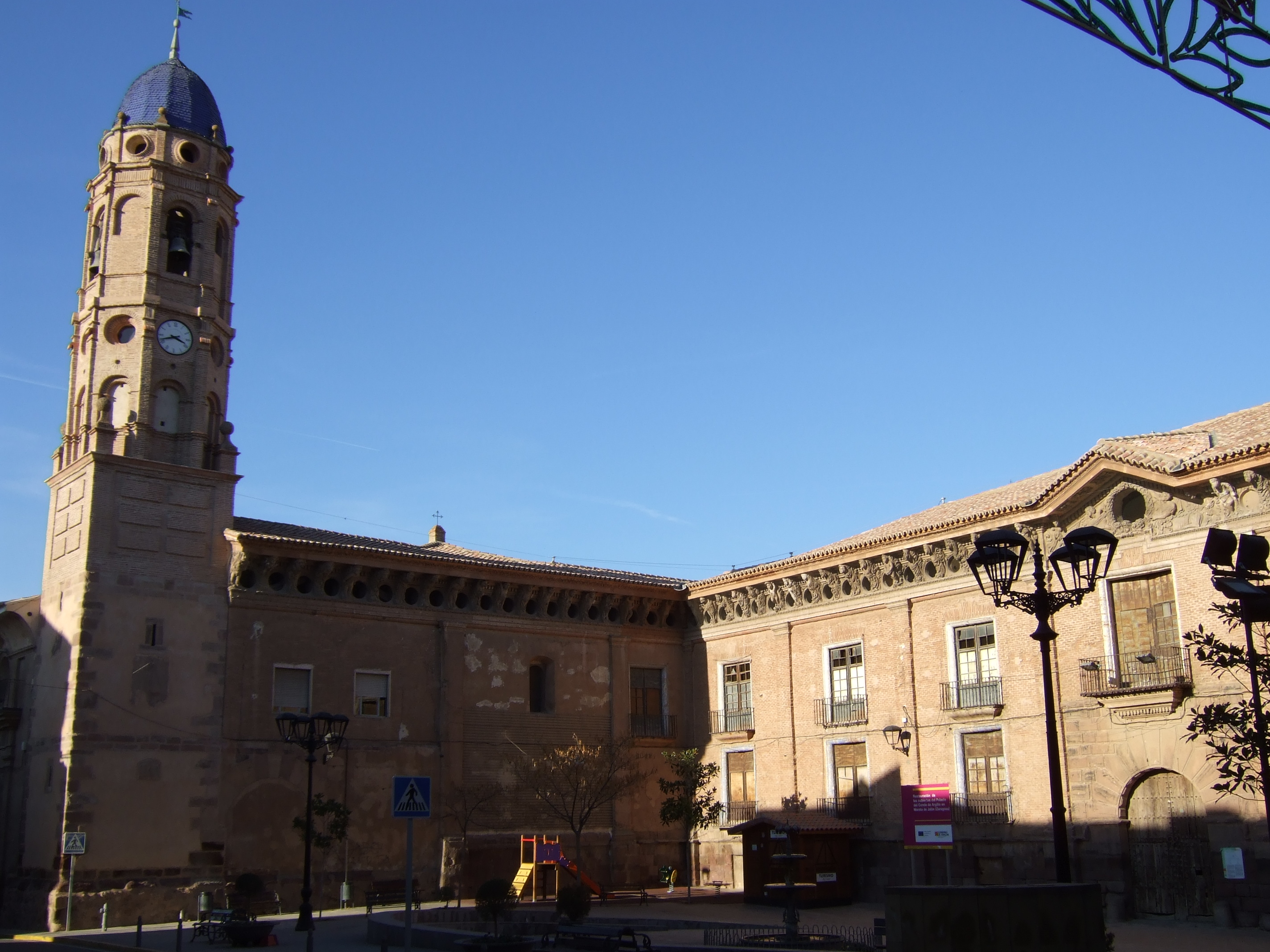 Morata de Jalón - Iglesia de Santa Ana - Palacio del conde de Morata o de los Condes de Argillo